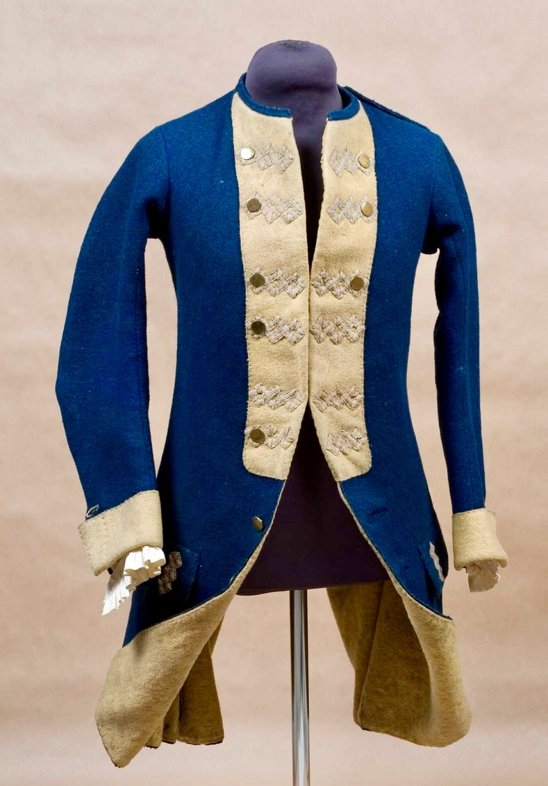 Tillhör Armémuseums samlingar.